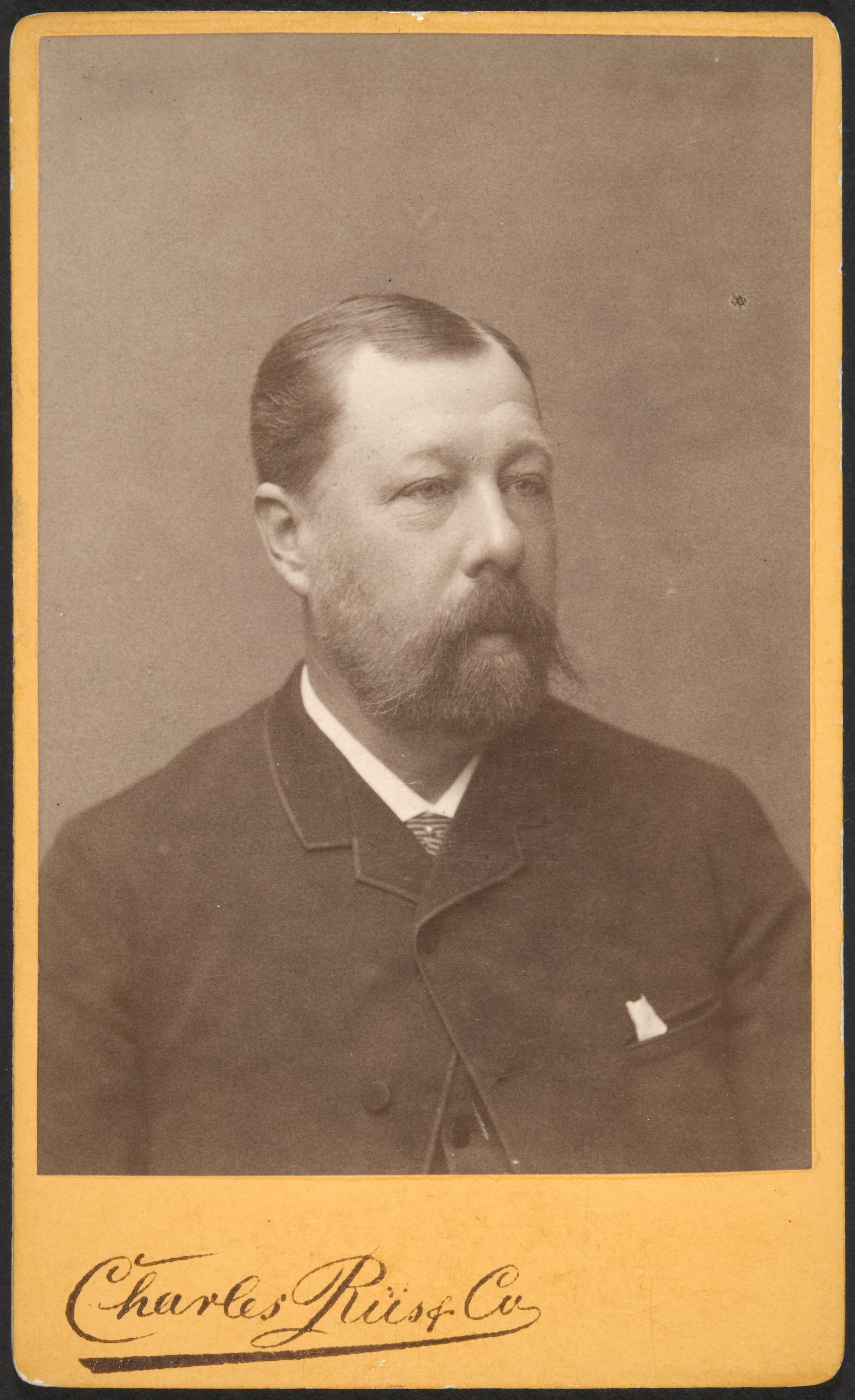 Художник Оскар Клейне (1846-1919)